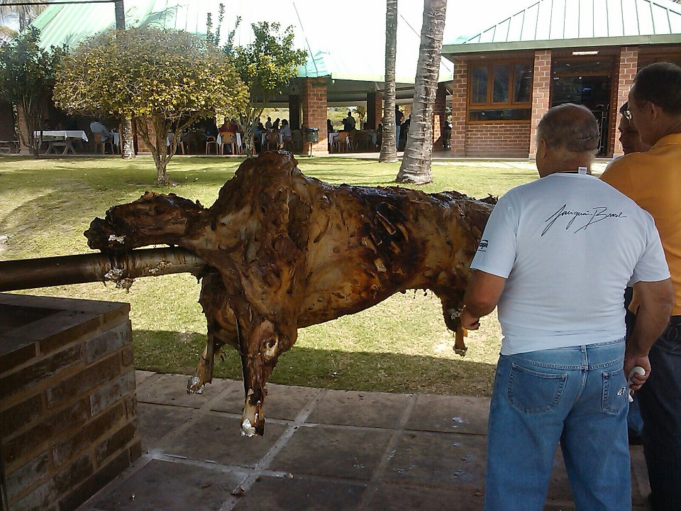 Boi no Rolete em Cachoeiro de Itapemirim